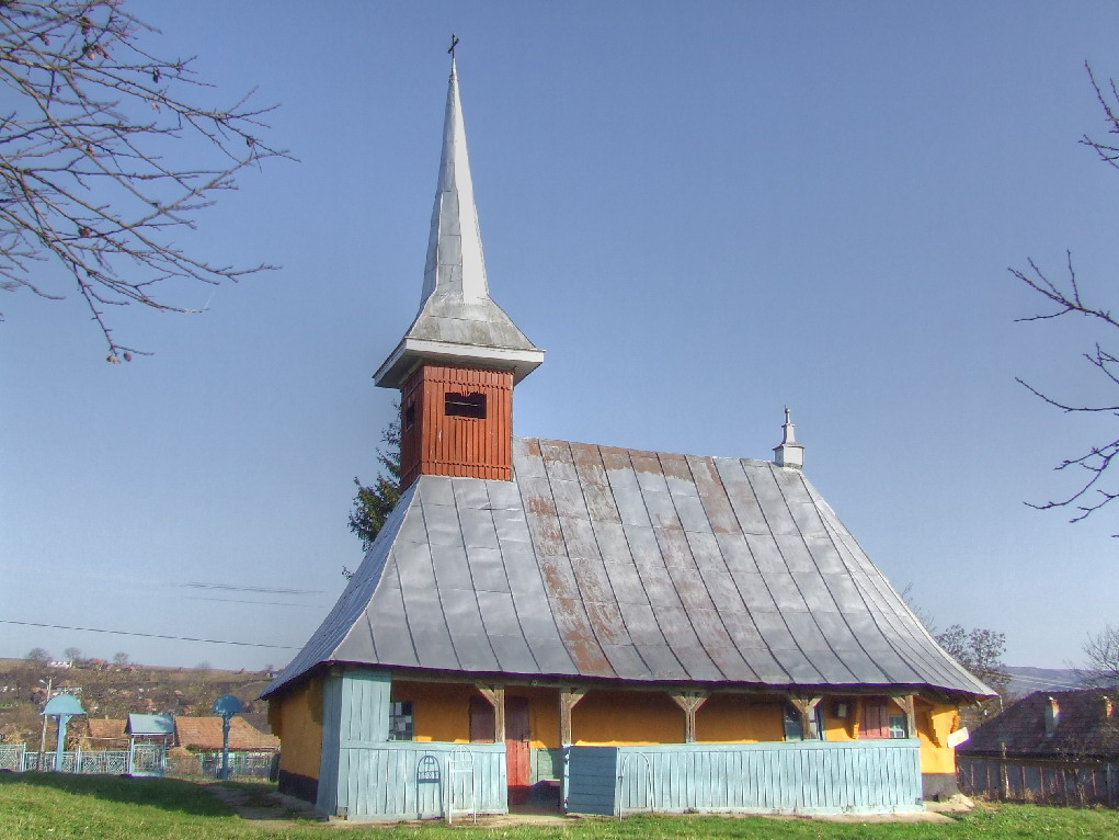 Biserica de lemn din Berchieş, judeţul Cluj.